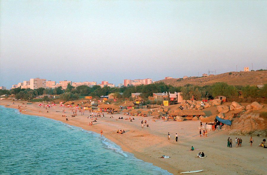 KaZantip in 1998